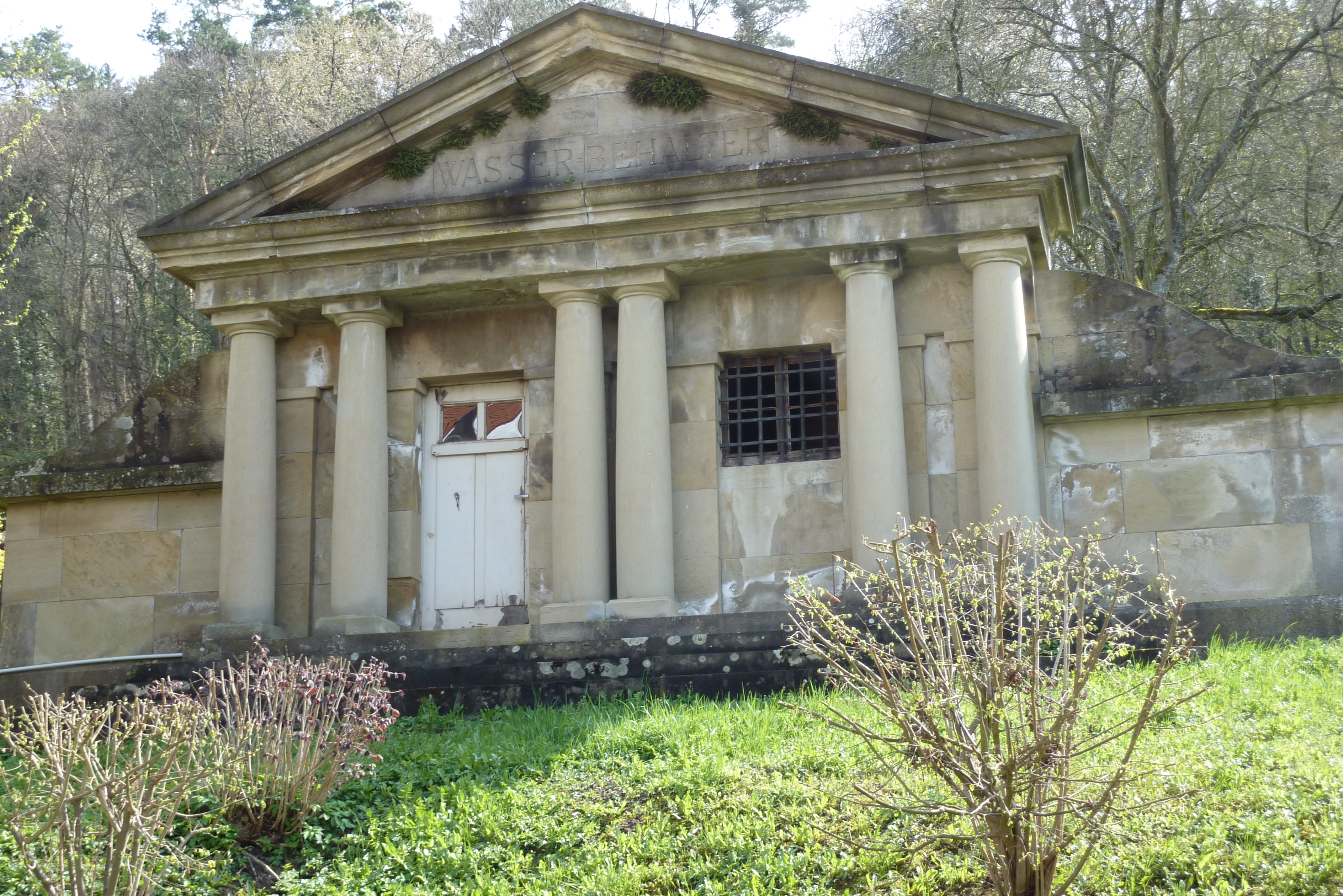 Wasserbehälter in Mühlbach (Eppingen), klassizistische Architektur, aus Sandstein gebaut